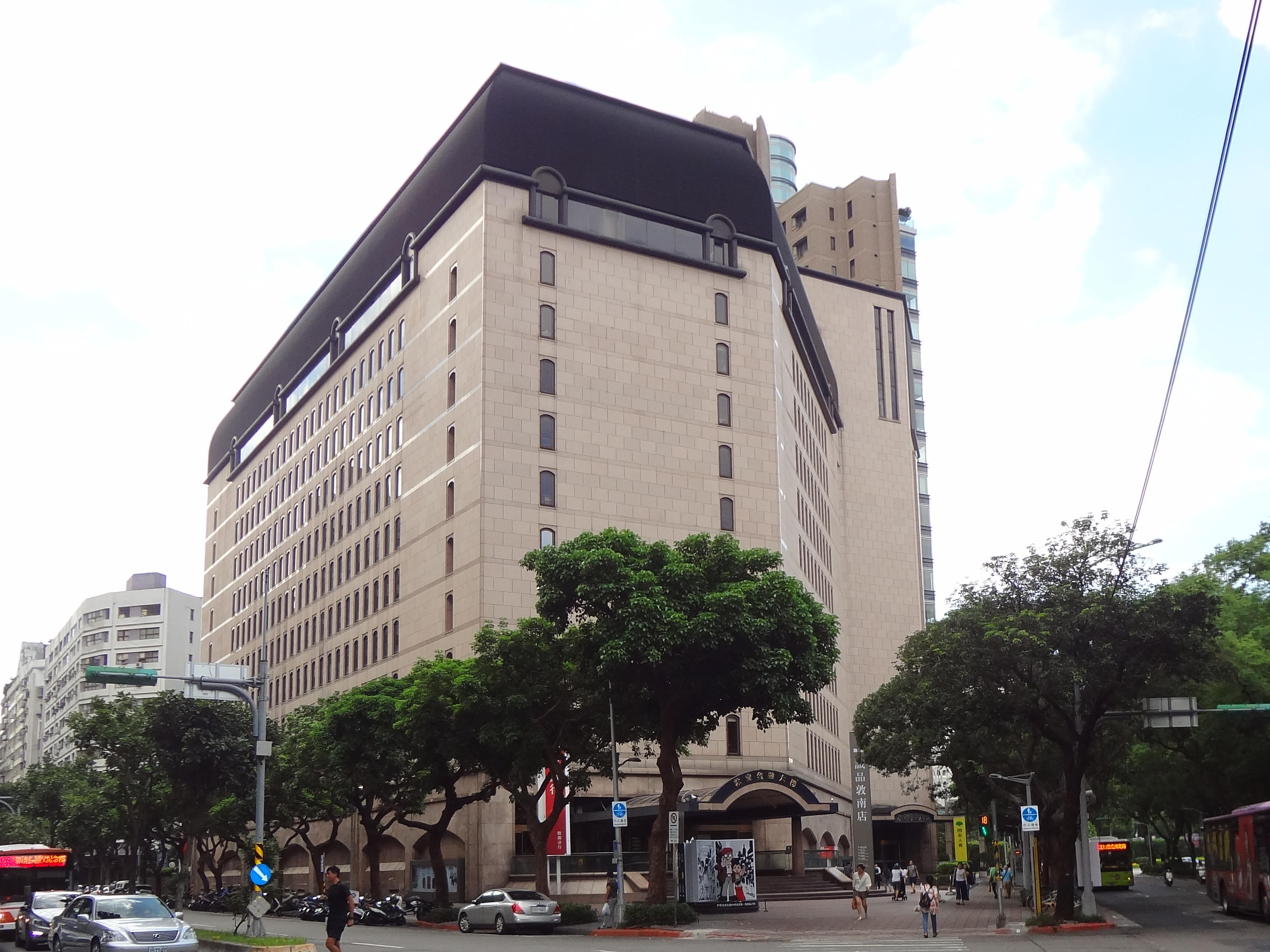 敦南金融大樓，位於臺北市大安區敦化南路一段243、245號。臺灣新光商業銀行敦南分行與誠品書店敦南店位於此。